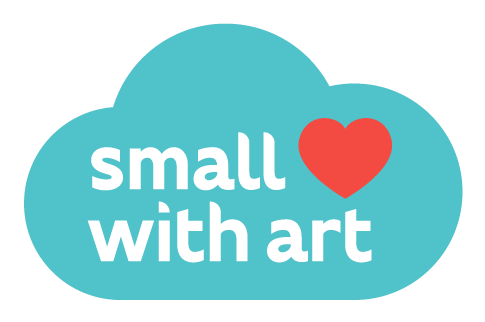 Логотип